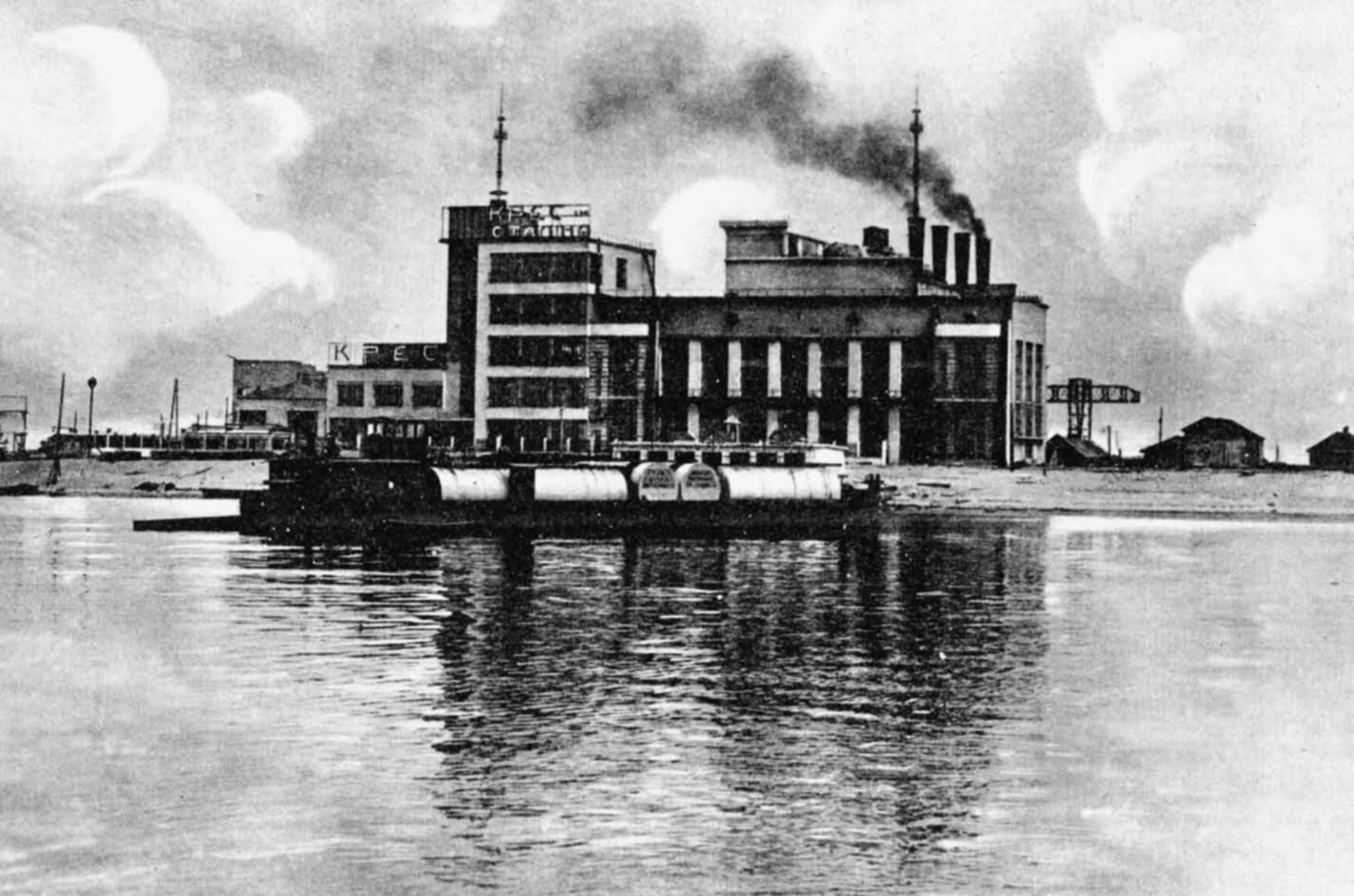 Київська районна електростанція, Київ, Електриків вул., 15